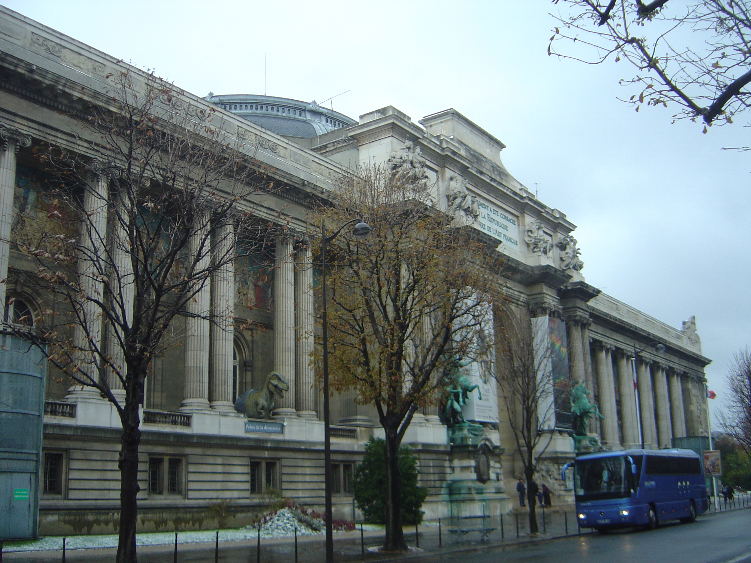 Grand Palais, Paris, France